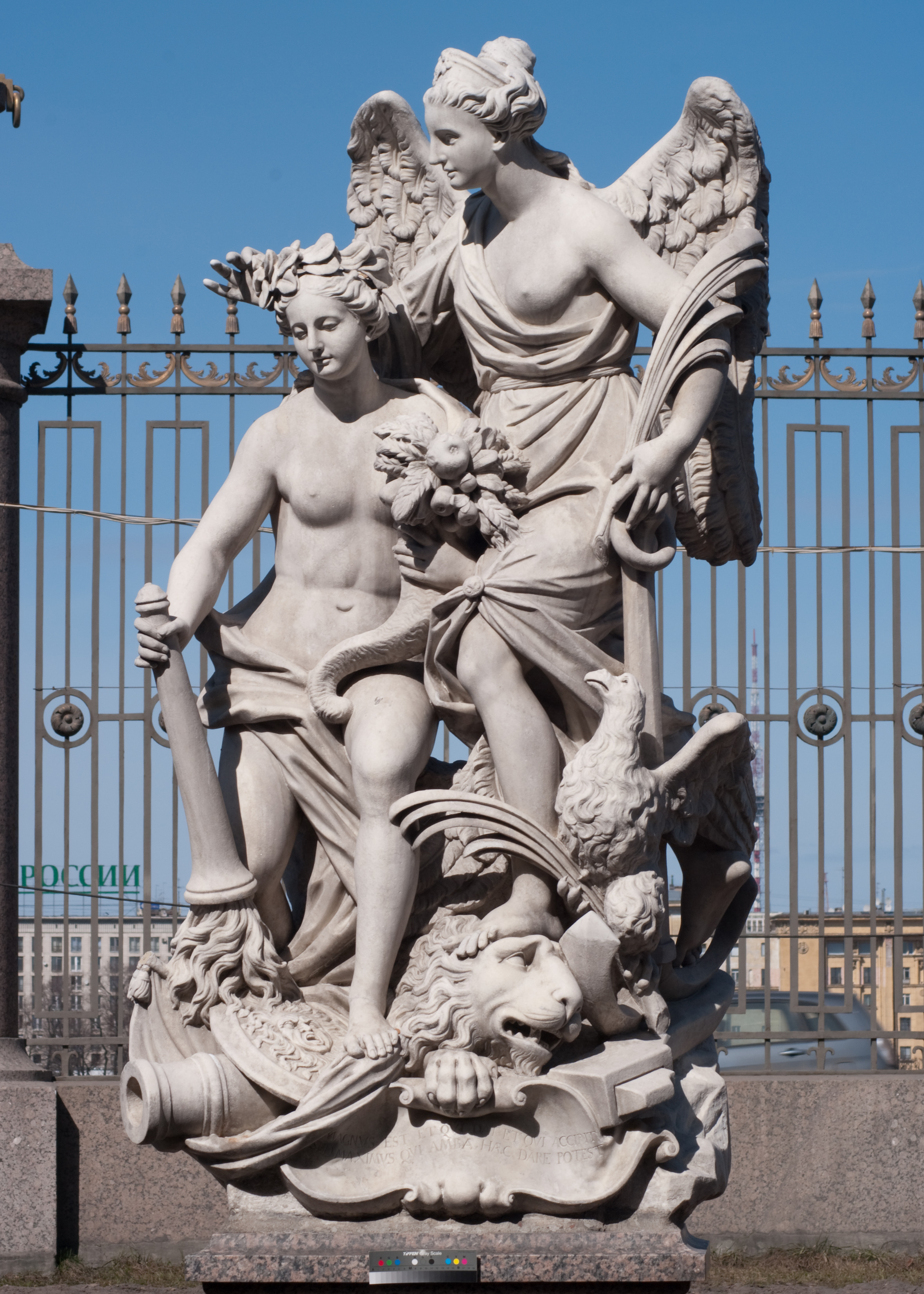 Скульптурная группа из коллекции Летнего сада (Петербург) "Мир и Победа. Ништадский мир" 1722 скульптор Баратта. Италия